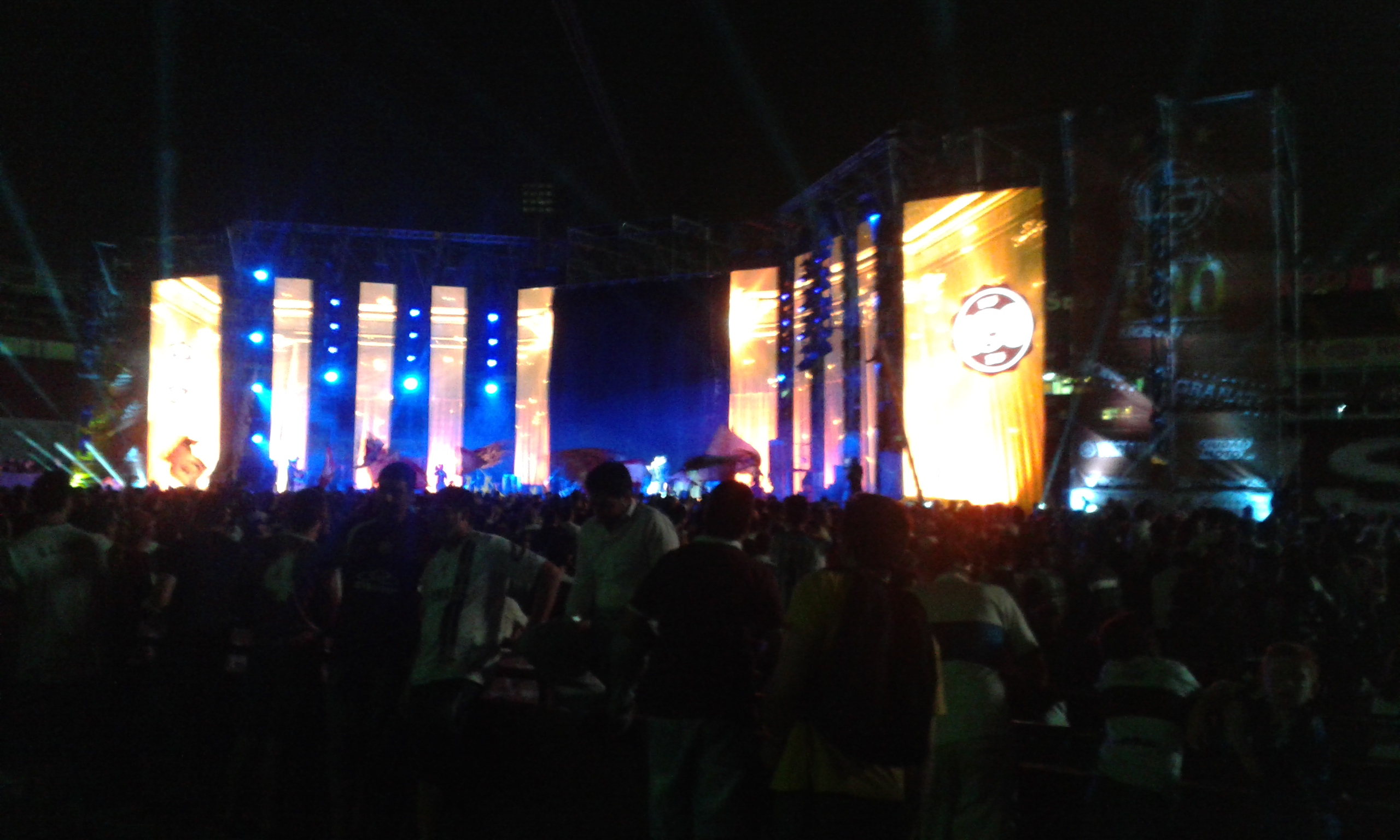 Escenario en el estadio.